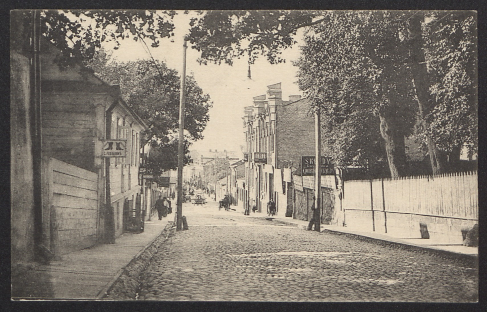 Беларуская (тарашкевіца): Менск (Miensk), вуліца Фэліцыянаўская (vulica Felicyjanaŭskaja)